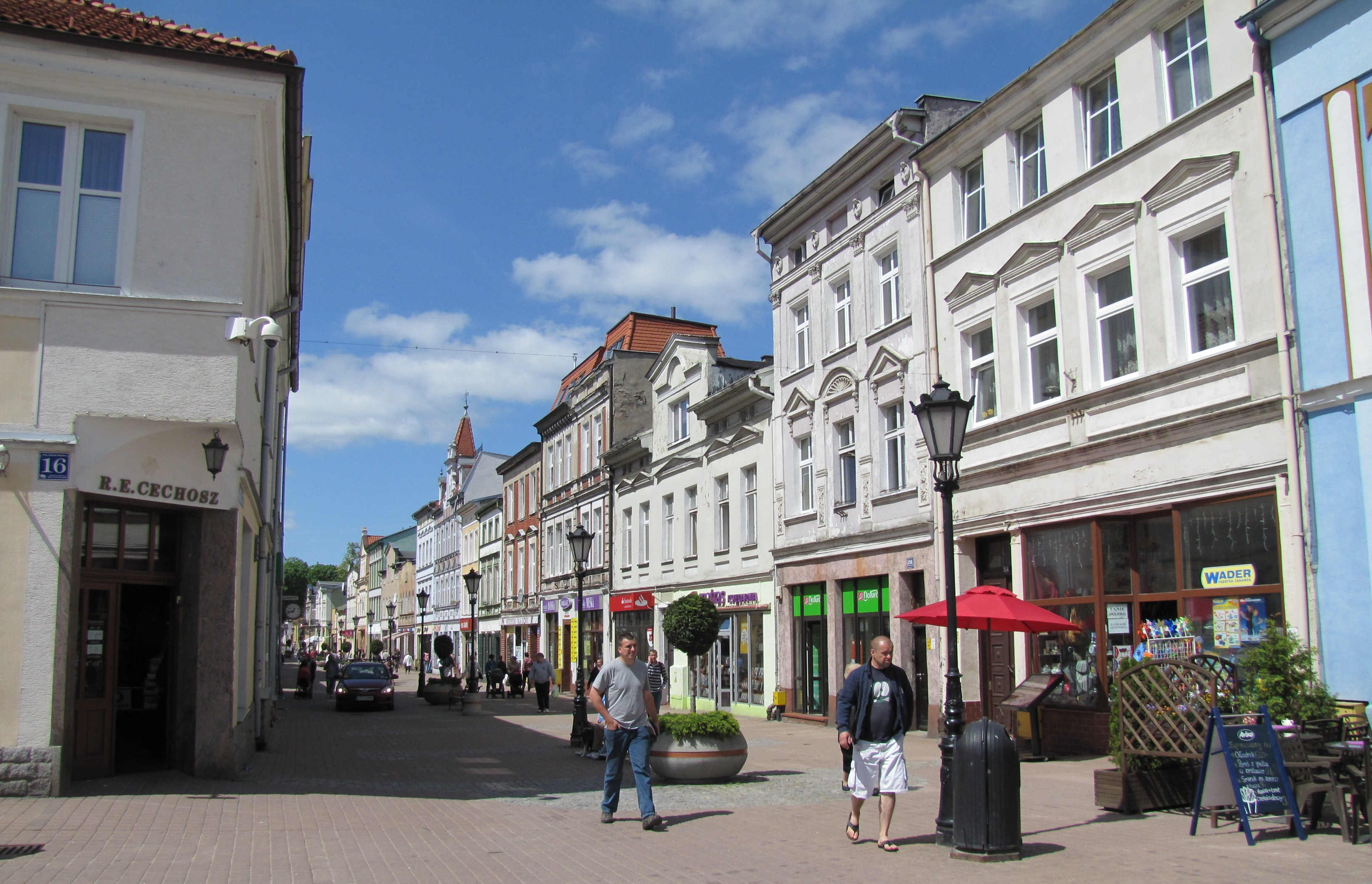 Wejherowo, Plac Jakuba Wejhera - szereg pięknych kamienic na Starym Mieście.